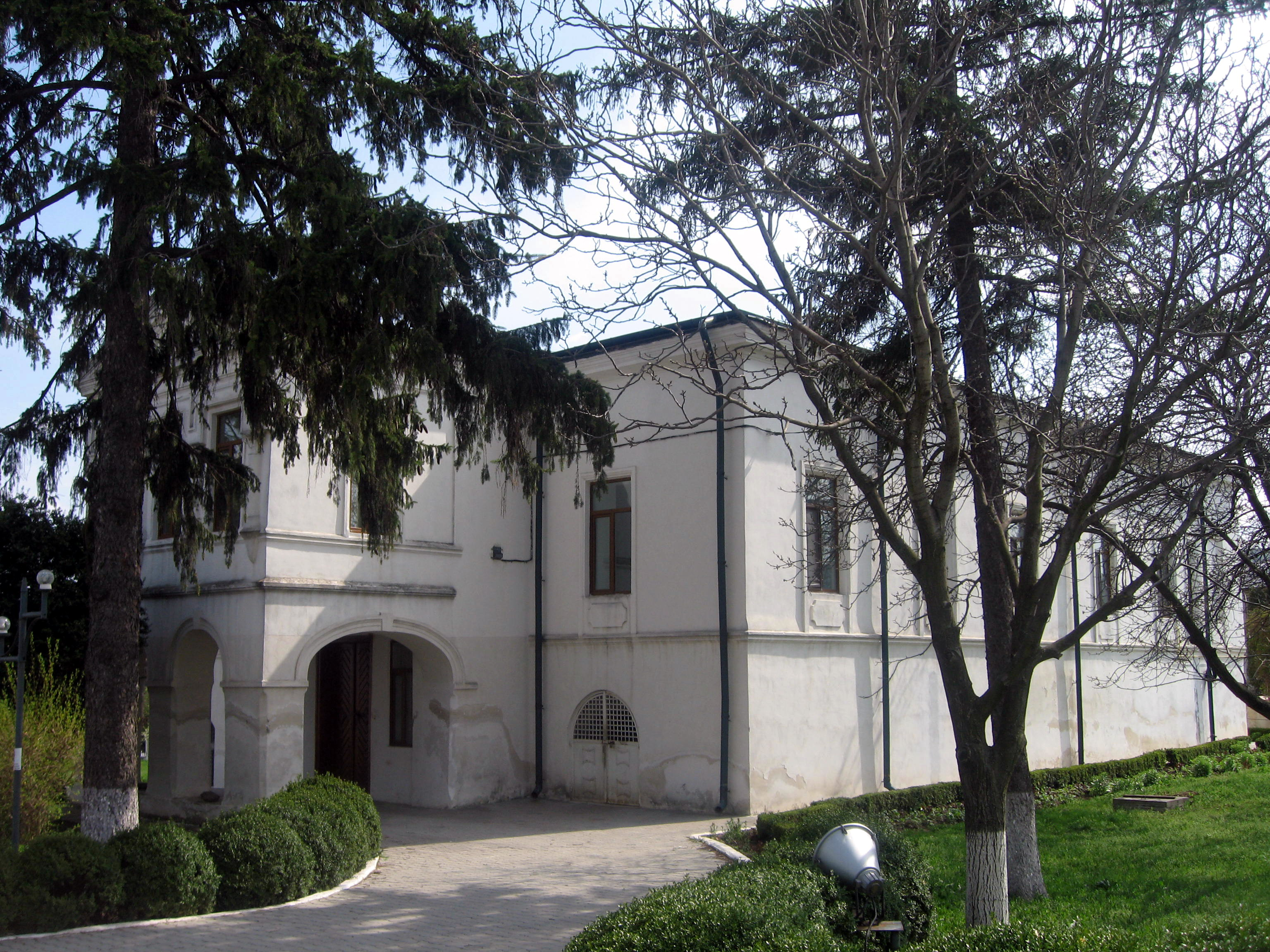 Catedrala episcopală din Huși 02